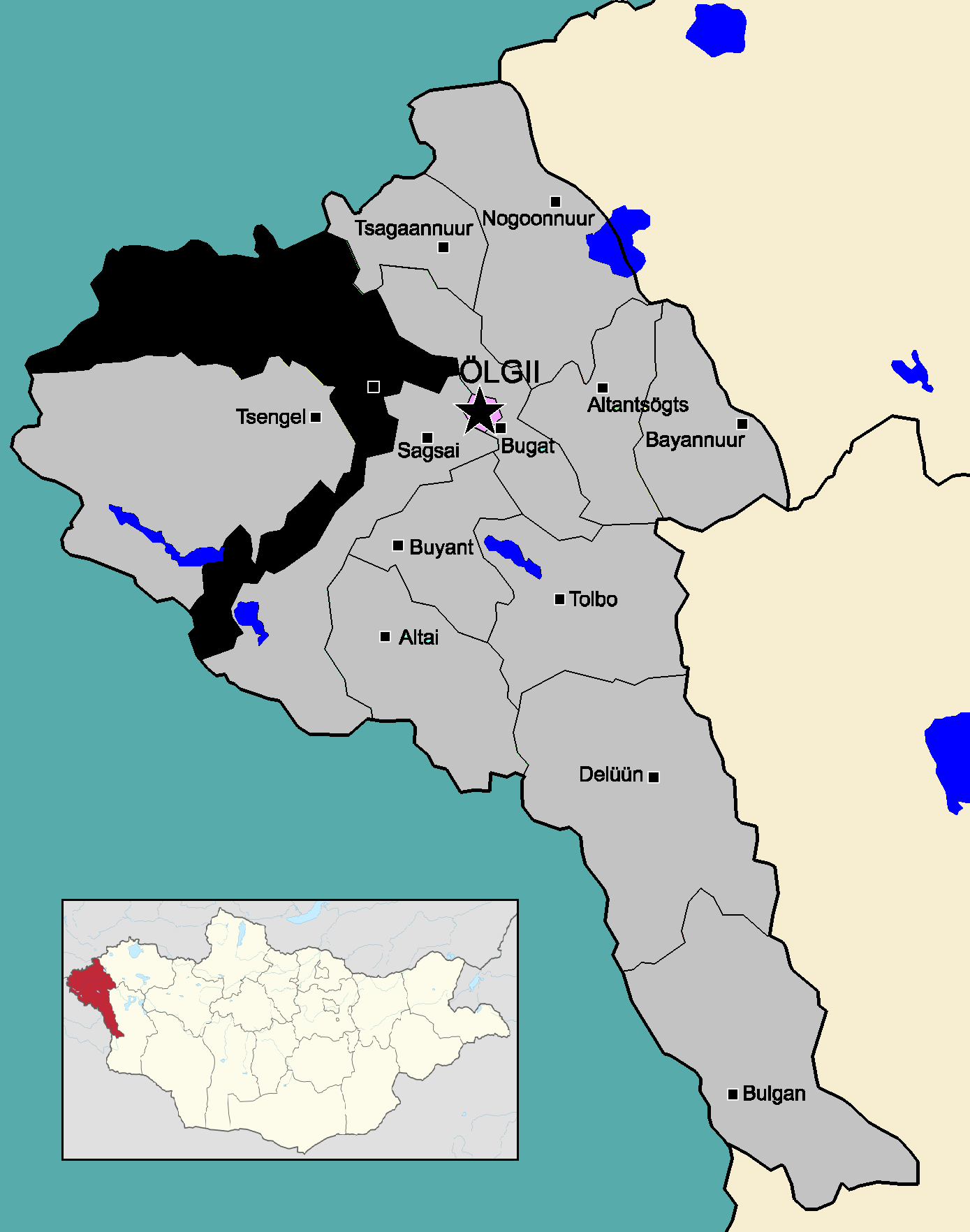 Map highlighting Ulaankhus sum (in black) in Bayan-Olgii airmag, Mongolia.